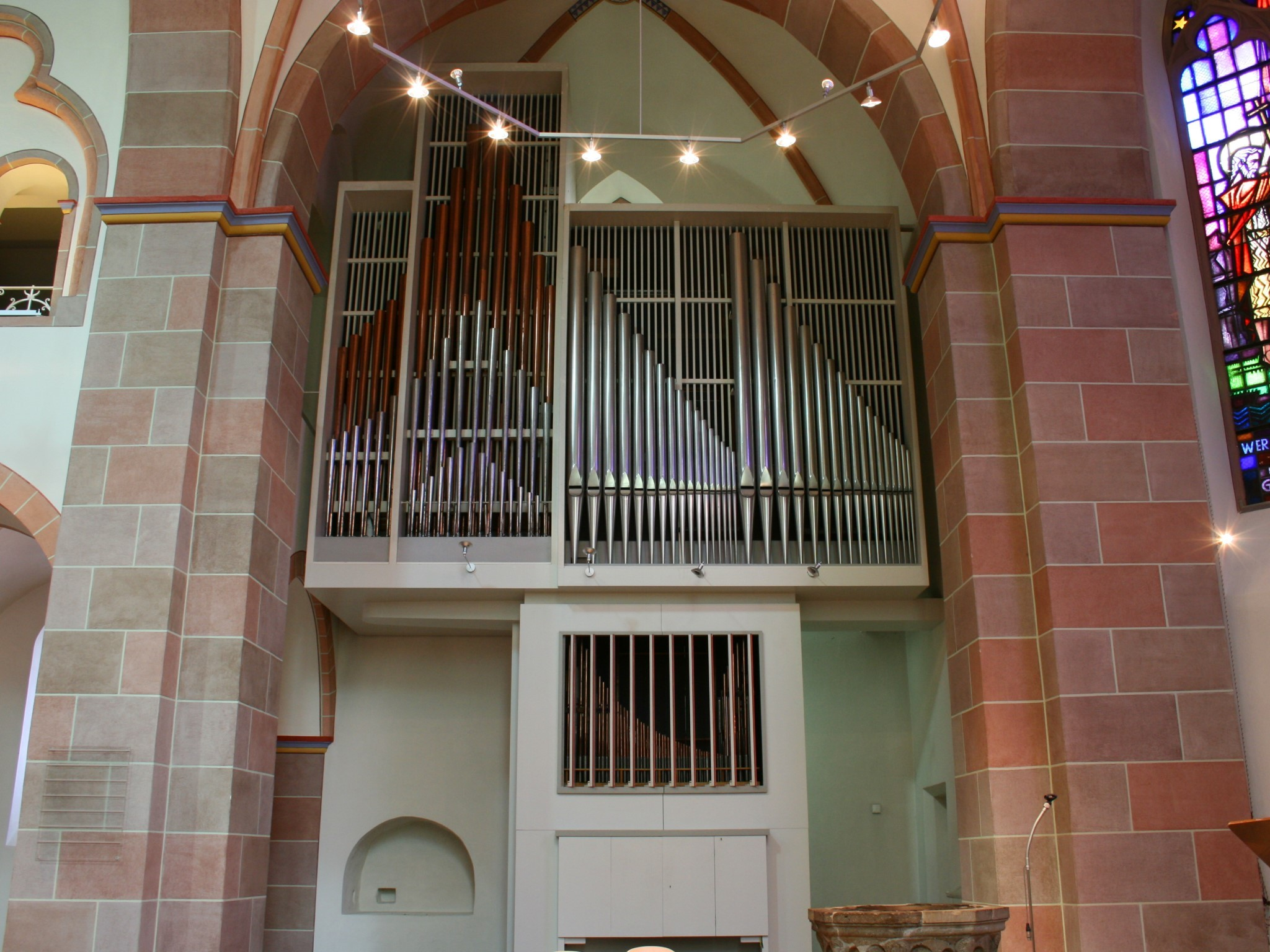 Jesus-Christus-Kirche in Meinerzhagen